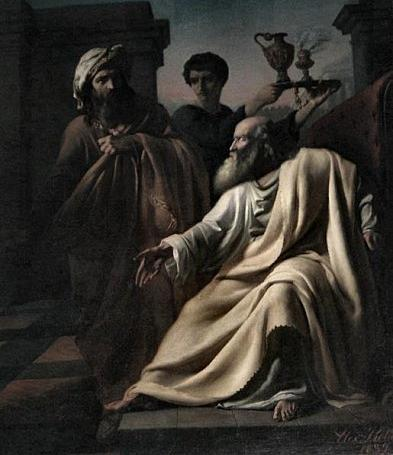 Jacob